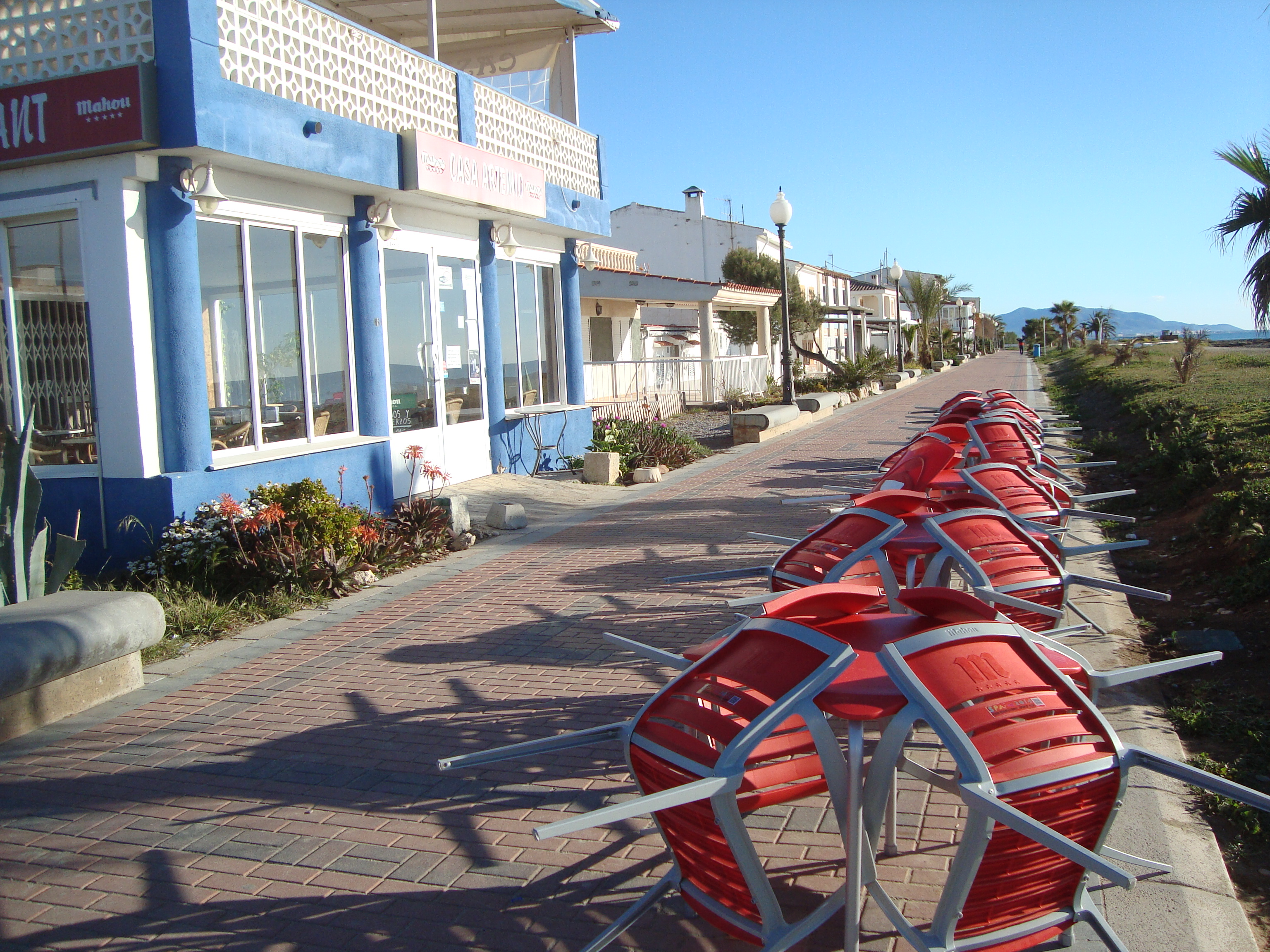 Poblado marítimo de Torrelasal, La Ribera de Cabanes (Cabanes, Castellón)